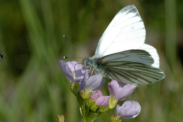 Picture taken in Commanster, Belgian High Ardennes . Species: Pieris napi male